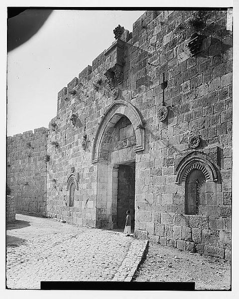 שער ציון. מאתר ספרית הקונגרס האמריקאי